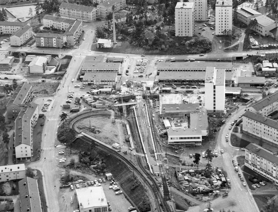 På bilden syns både den gamla vändhållplatsen för spårvagnar och den nya tunnelbanestationen Fruängen som är under uppförande.